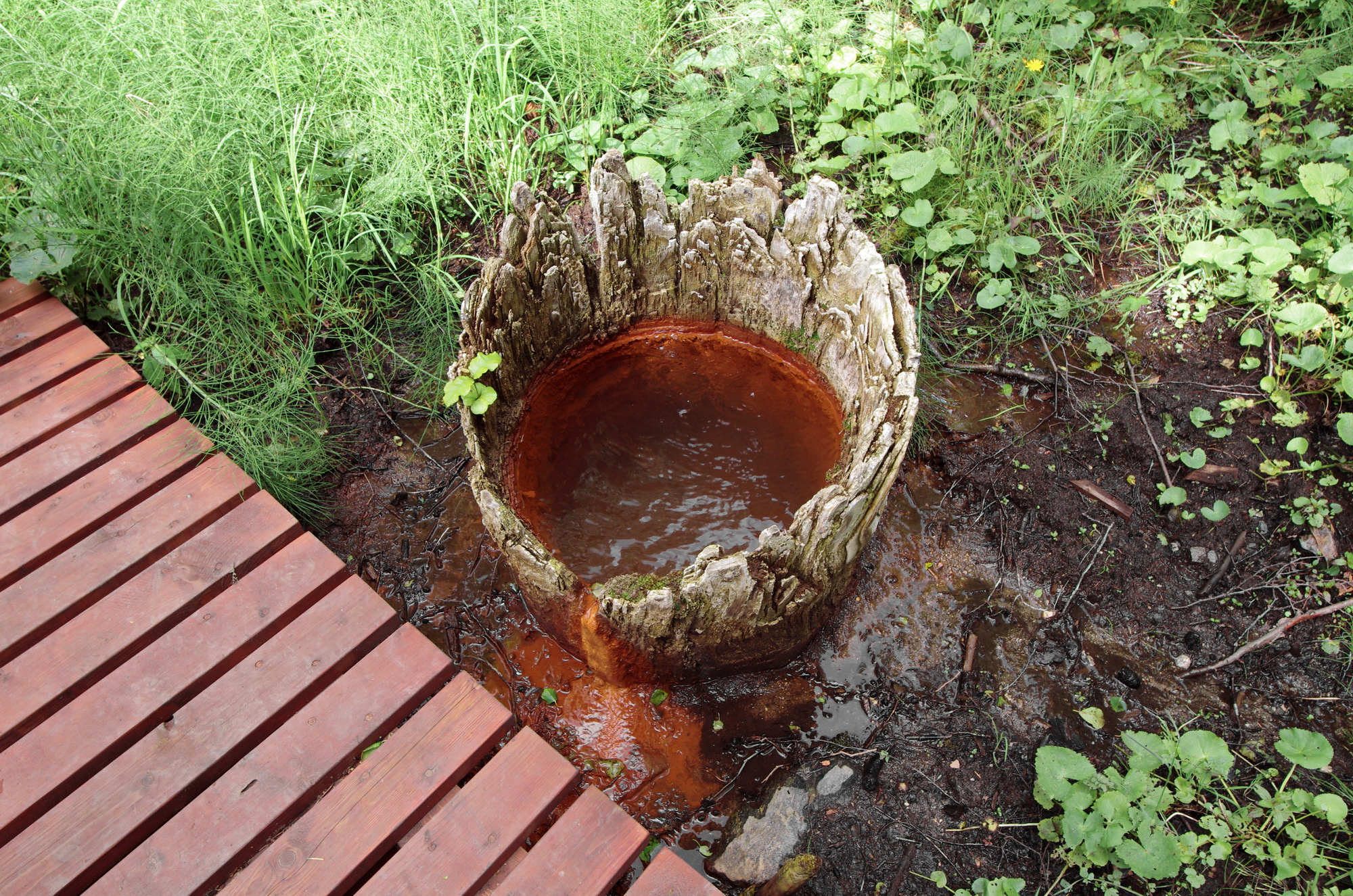 Přírodní památka Koňský pramen, u Chotěnova-Sklářů (místní část Mariánských Lázní), okres Cheb